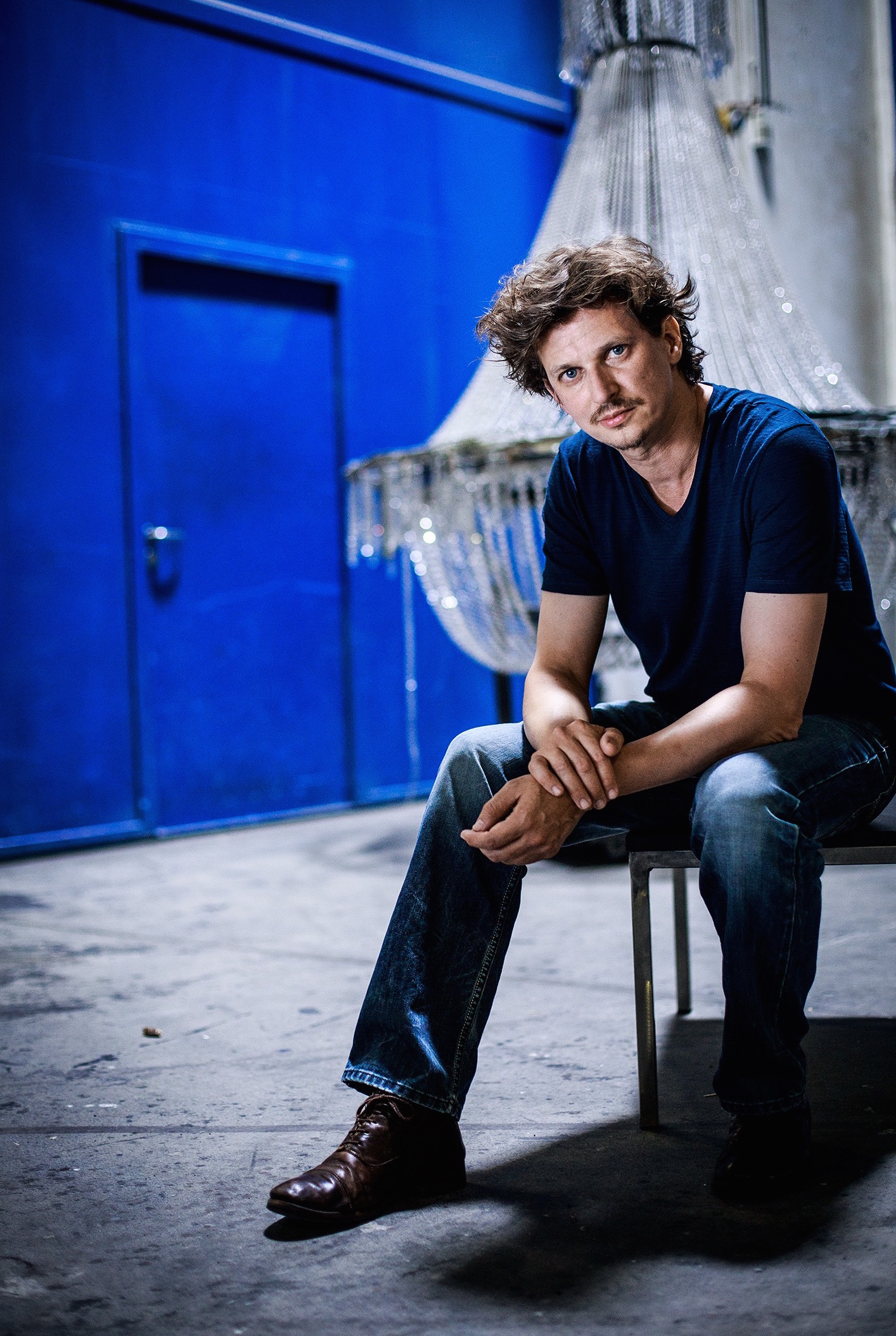 Portrait Malte Kreutzfeldt (Regisseur) von Jonas Ratermann, Frankfurt/Main 2013